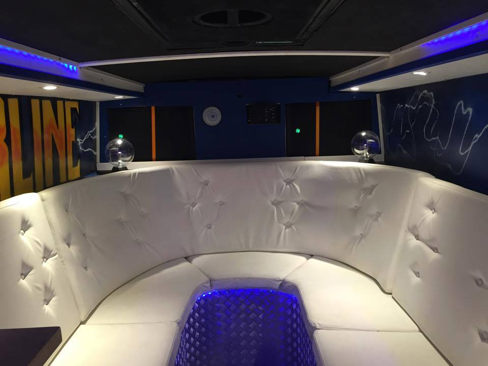 Bilde av loungen til "Powerline 2015 - Romeriksrussen". Et godt eksempel på en pen og stilfull lounge som viser hvor nøye dette er for russen.